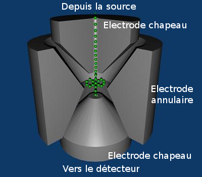 schéma d'un analyseur de type trappe ionique (pièges à ions) 3D et trajectoire des ions, en spectrométrie de masse